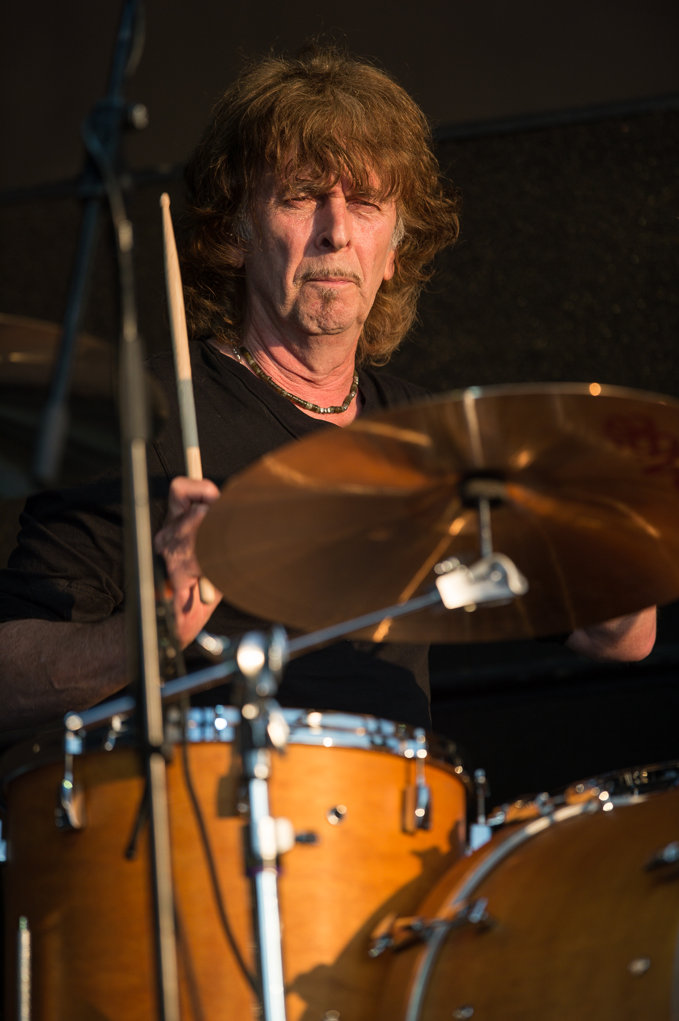 Brombachsee,Concertbüro Franken,Festival,John Lingwood,Konzert,Lieder am See,Livekonzert,Livemusik,Manfred Mann’s Earth Band,Musik